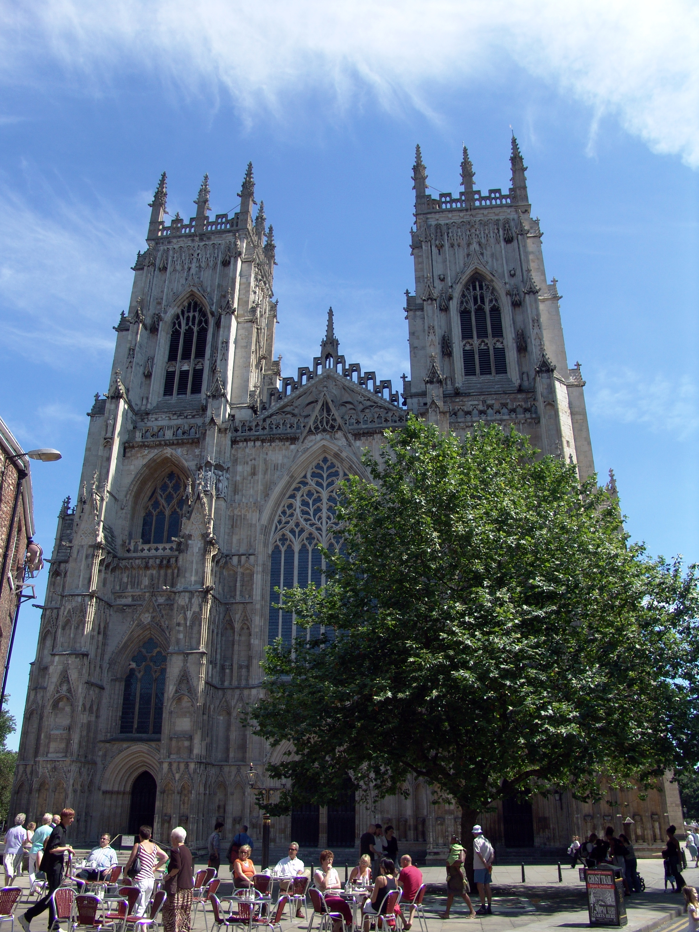 York Minster